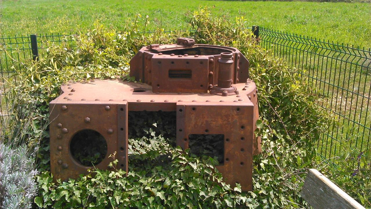 Εγκαταλελειμμένος πυργίσκος από άρμα Pz 38, απομεινάρι του Β΄ Παγκοσμίου πολέμου.